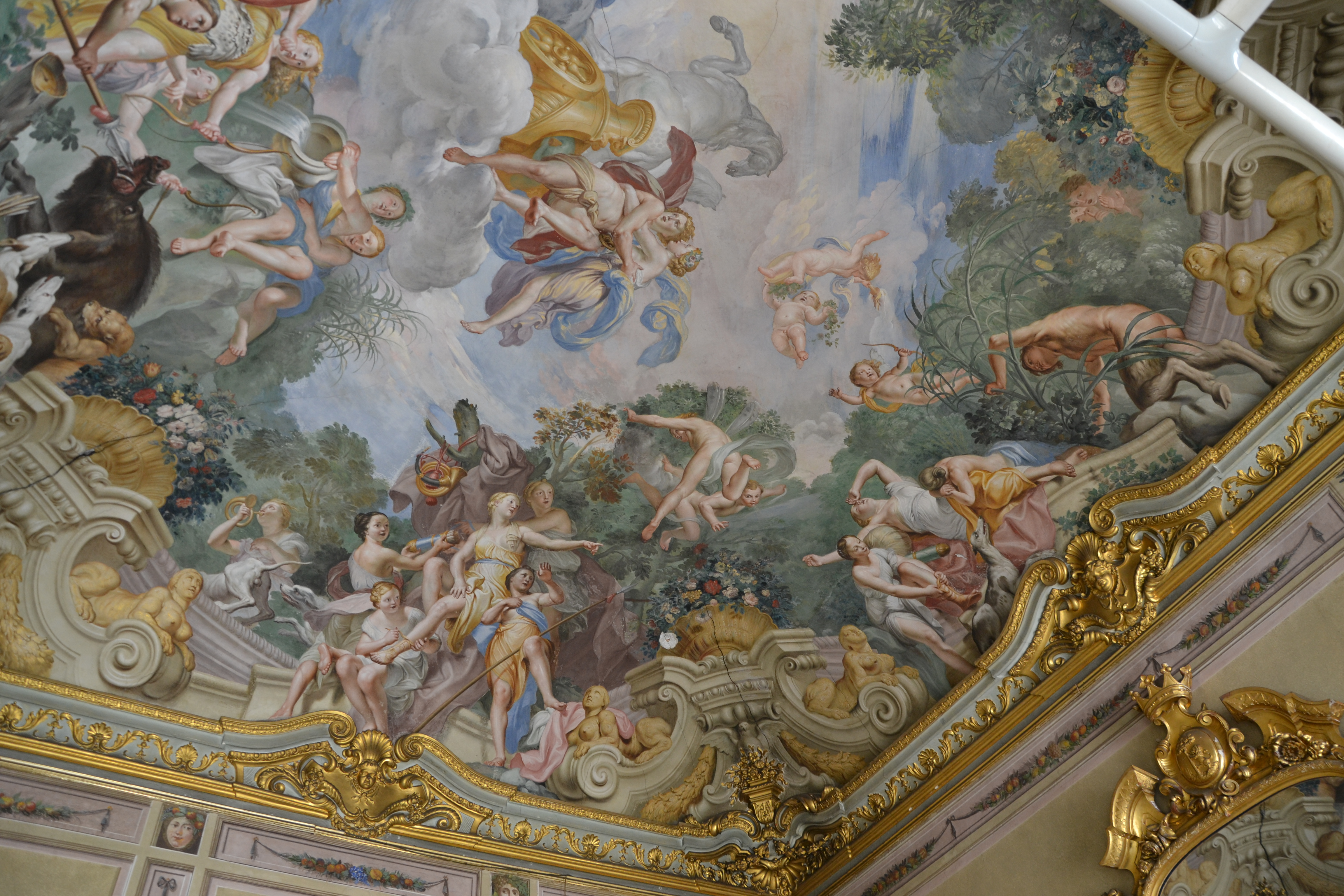 Lorenzo De Ferrari, Caccia di Diana, Palazzo Grimaldi di Vico San Luca, Genova, decorazioni commissionate dal Doge Luca Grimaldi negli anni 30 del Settecento